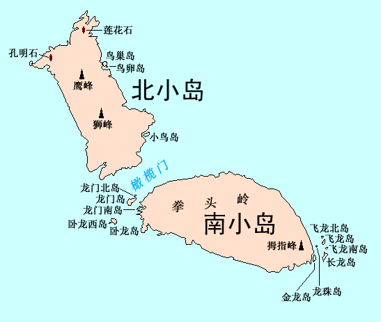 中文（中国大陆）: 南小岛、北小岛标准地理名称